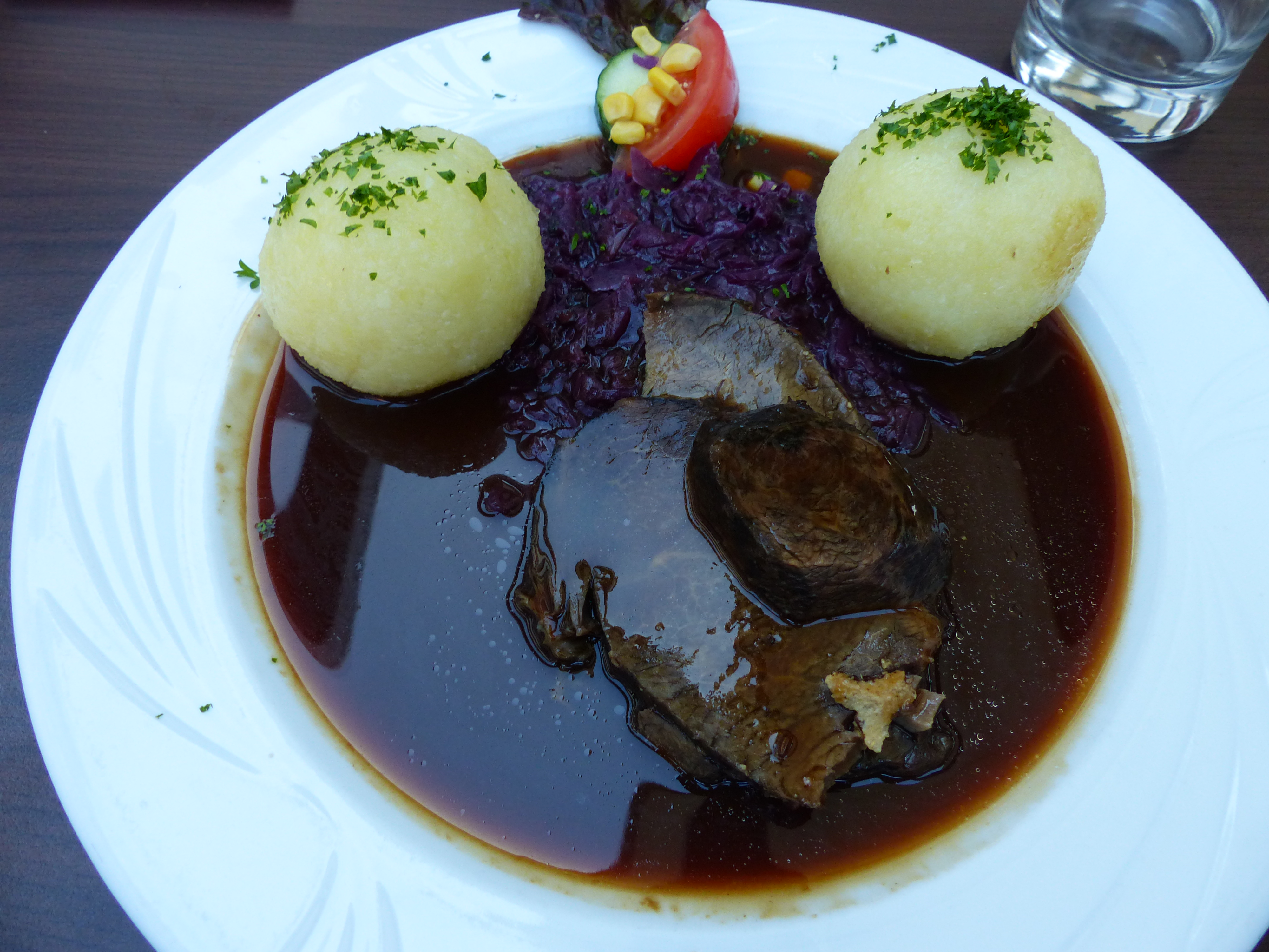 Heldrunger Sauerbraten, Köstritzer Schwarzbierhaus, Weimar